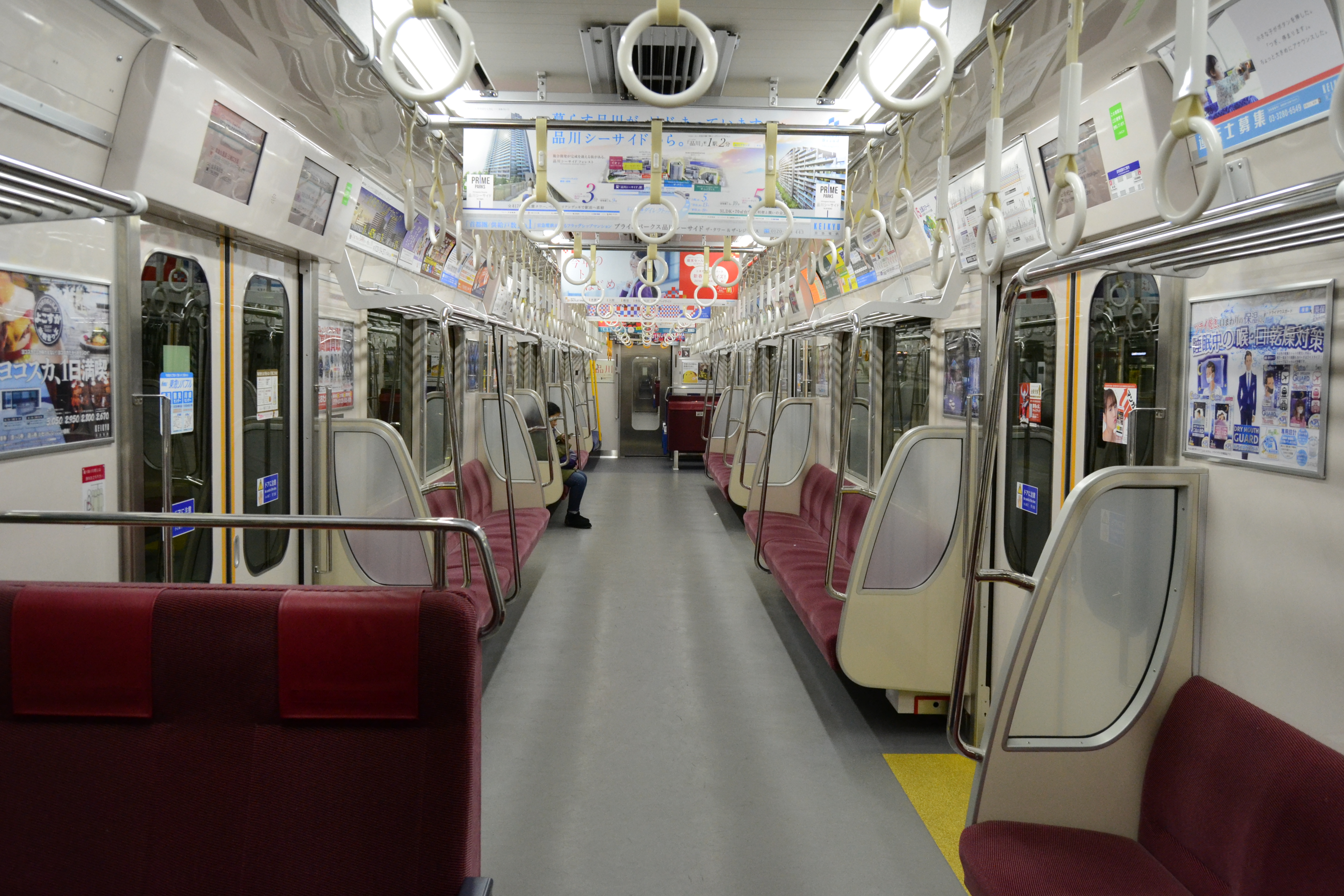 京急1000形（2代）1600番台の車内。